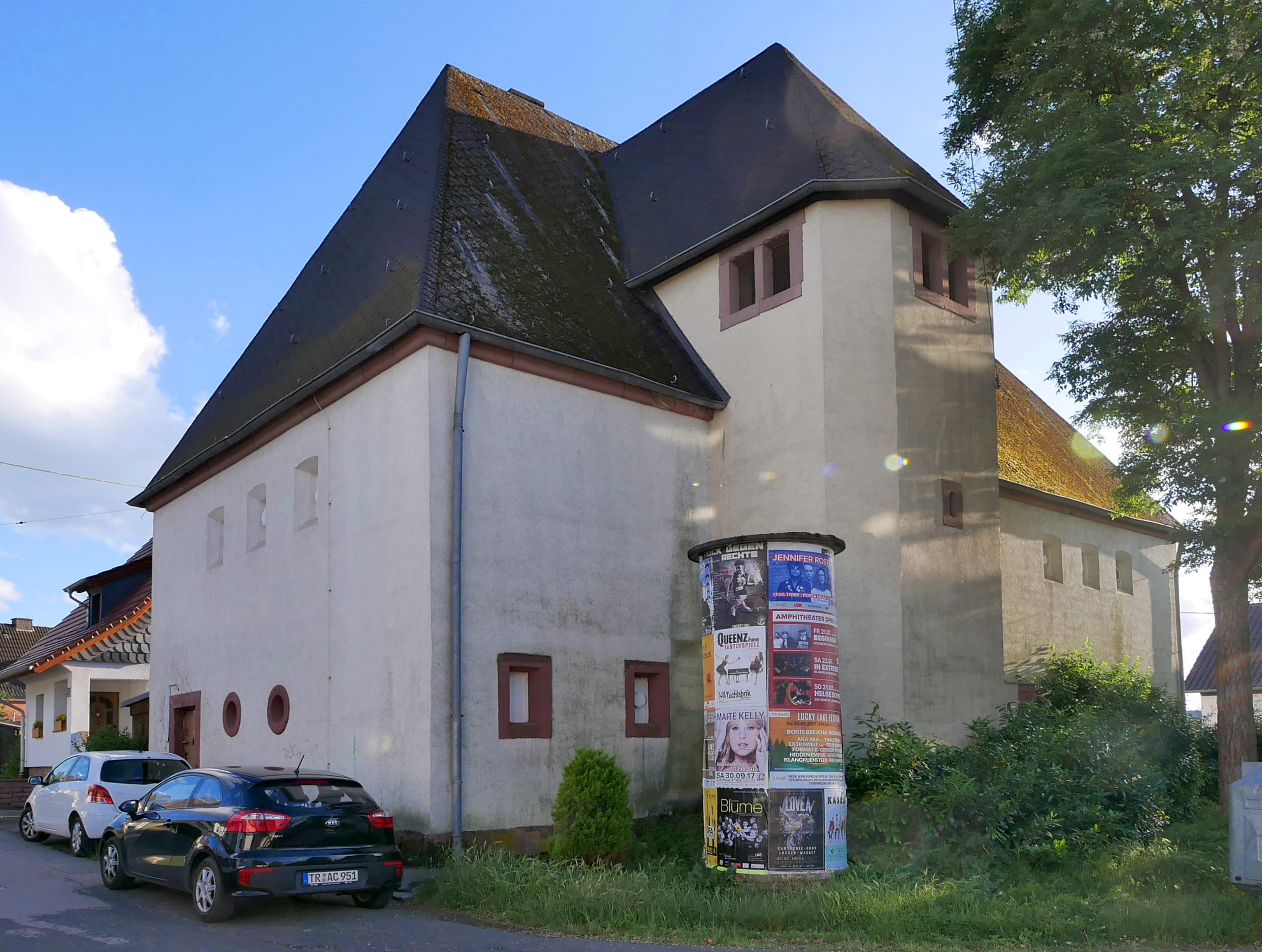 Einer der sieben Bunkerbauten, die infolge des im Herbst 1940 reichsweit verordneten Bunkerbaus zum Schutz der Zivilbevölkerung im Trierer Stadtgebiet nach Plänen des Städtischen Hochbauamtes unter Heinrich Otto Vogel errichtet wurden, steht an der Einmündung der Straße Am Bildstock in die Straße Im Hofacker. Der Hochbunker ist zweigeschossig mit hohem Walmdach und vorspringendem turmartigen Treppenhaus mit eigenem Walmdach. Wie die anderen beiden Hochbunker in der Thyrsusstraße (Trier-Nord) und Augustinerhof wurde dieser Hochbunker entsprechend mit historisierenden Einzelelementen versehen, so Sockelplatten, Umrahmungen der Öffnungen (fensterartige Blenden um die kreisrunden Luftlöscher) und karniesförmiges Traufgesims in rotem Sandstein.